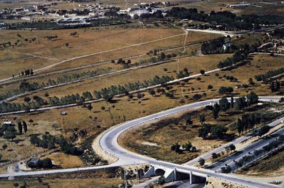 Foto Aerea Alameda de Osuna en 1969